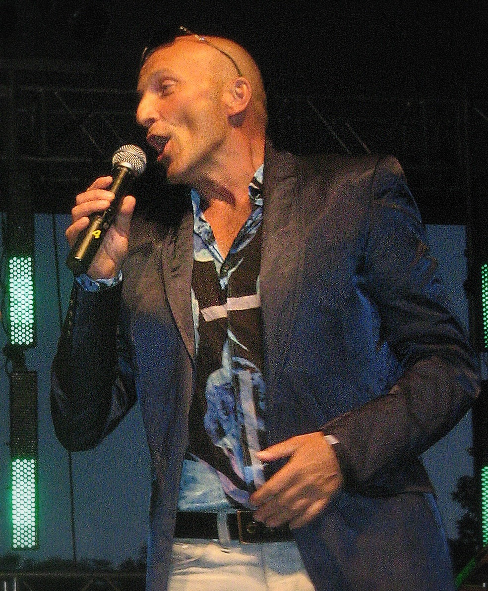 Robert Rozmus